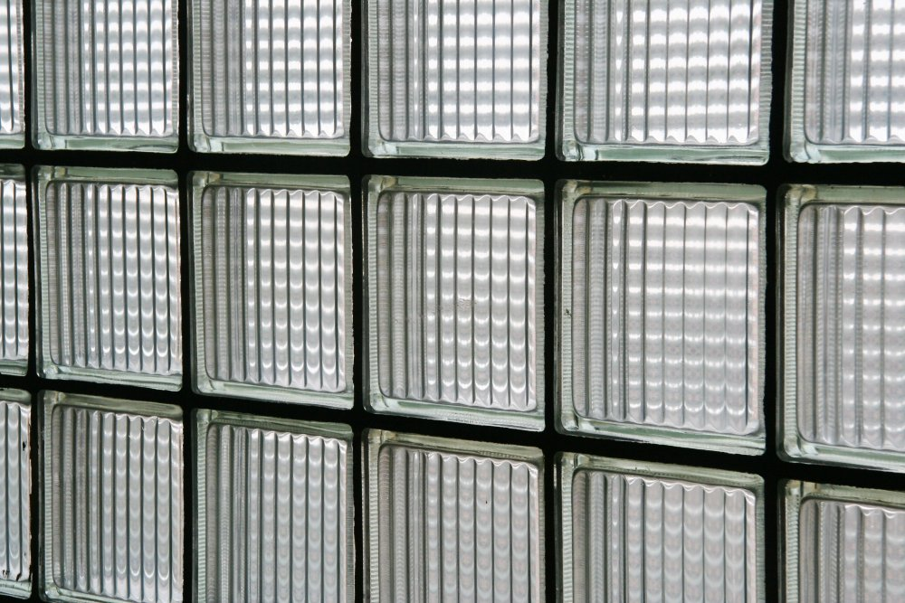 Glasbaustein im Treppenhaus eines Gebäudes